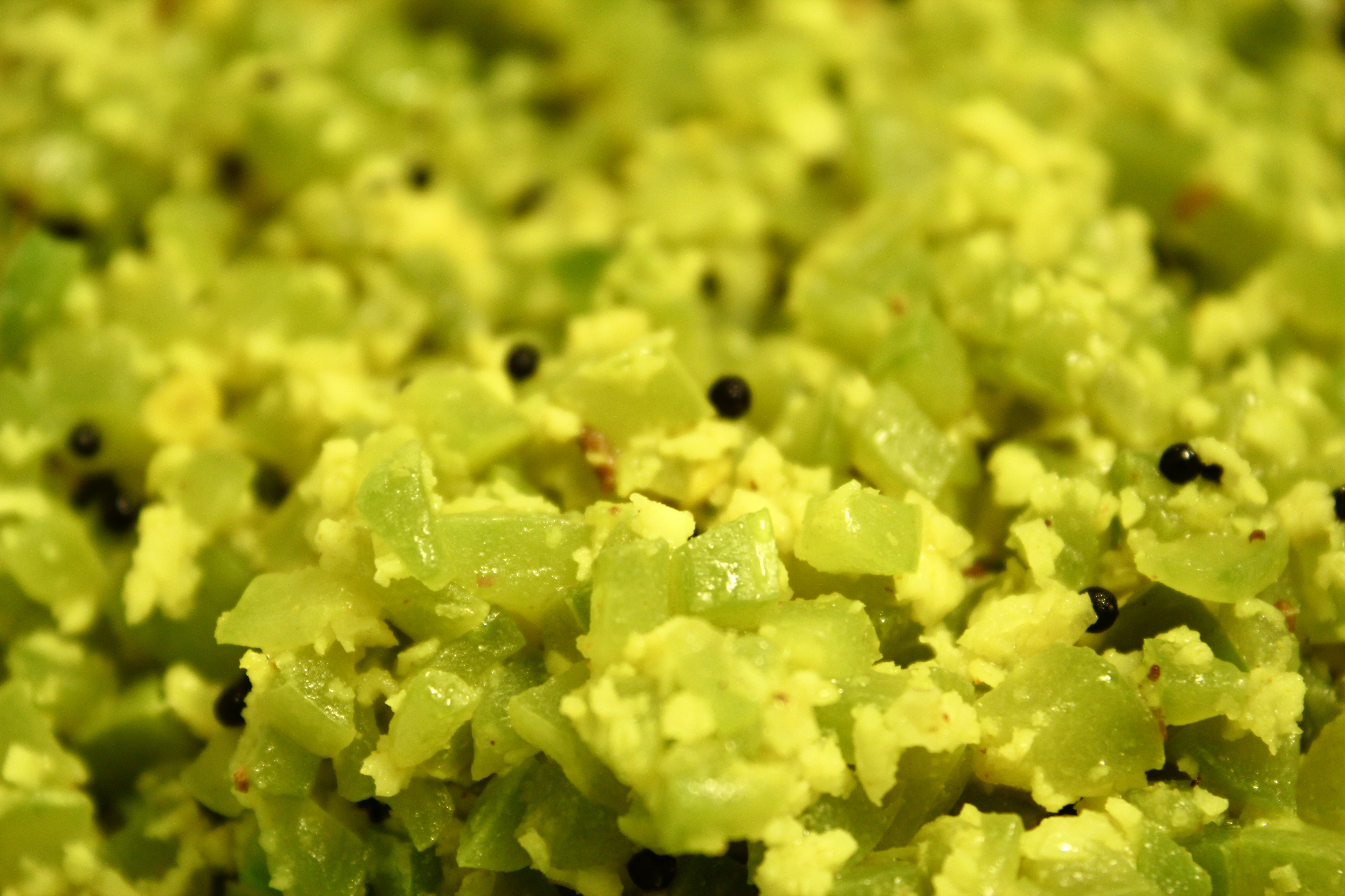 Kerala vegetable preparation